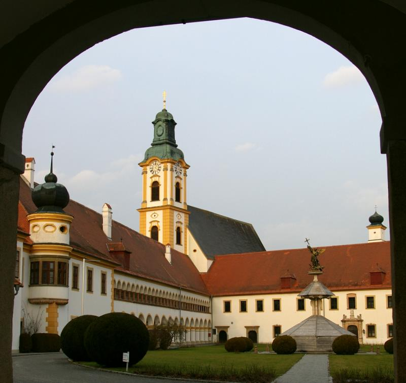 Stift Reichersberg. Blick durch das Eingangstor in den Innenhof